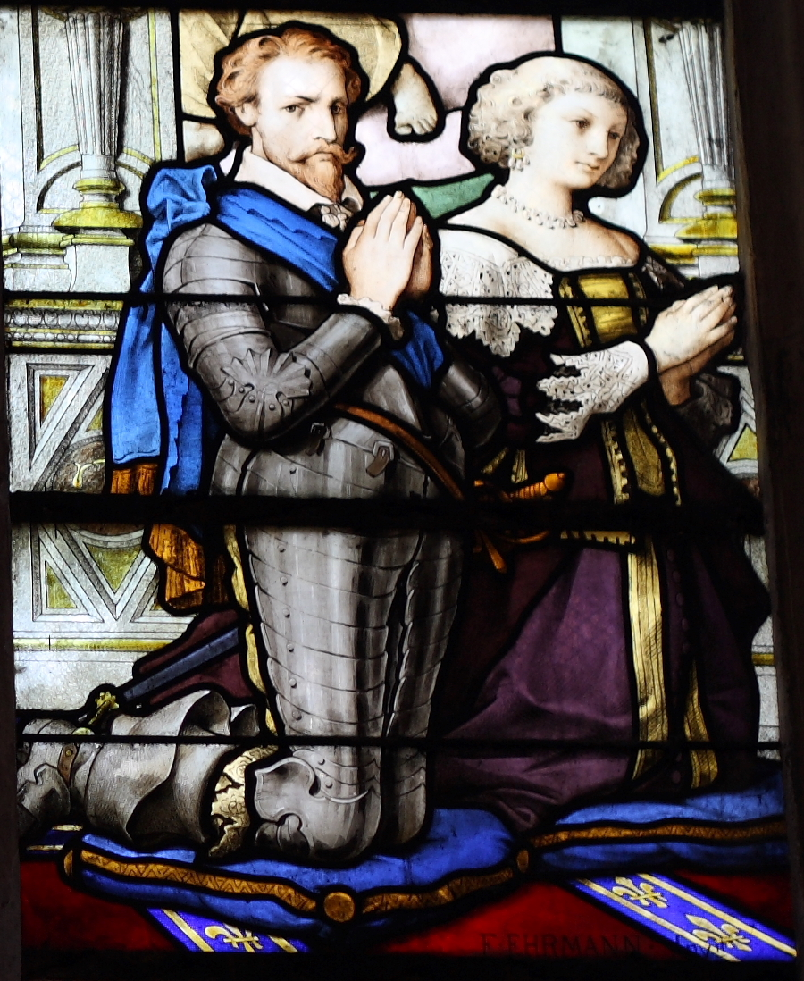 Bleiglasfenster (Ausschnitt) in der katholischen Pfarrkirche Saint-Martin (Collégiale Saint-Martin) in Montmorency, Darstellung: Henri II. de Bourbon und Charlotte-Marguerite de Montmorency; Fenster aus dem 19. Jahrhundert